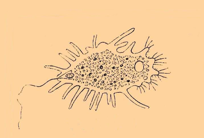 Mastigamoeba aspera